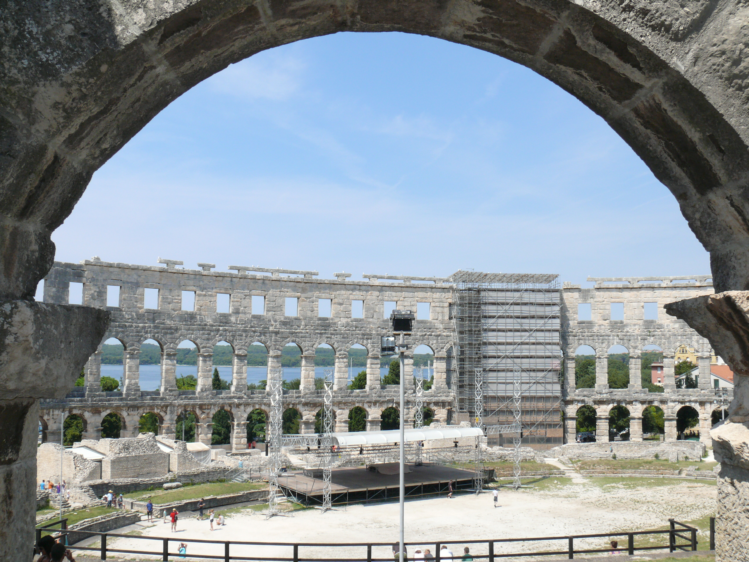 Photos d'Italie et de Croatie L'amphithéâtre de Pula